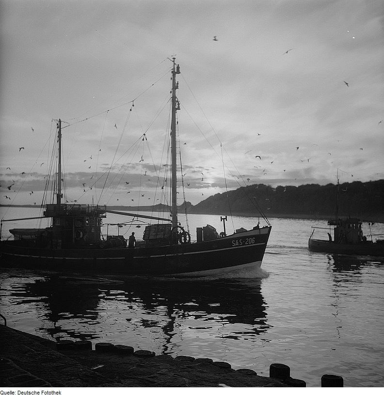 Original image description from the Deutsche FotothekSaßnitz. Fischerboot auf der Fahrt in den Hafen